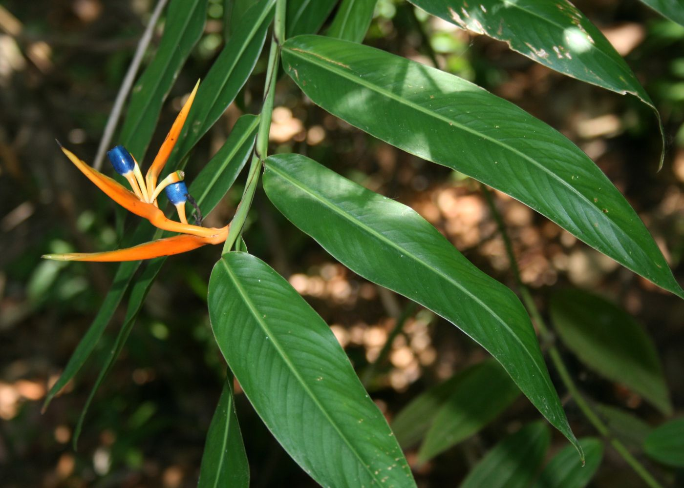 Heliconia longiflora, Heliconiaceae - Costa Rica: Prov. Puntarenas, Hacienda Barú NW Dominical